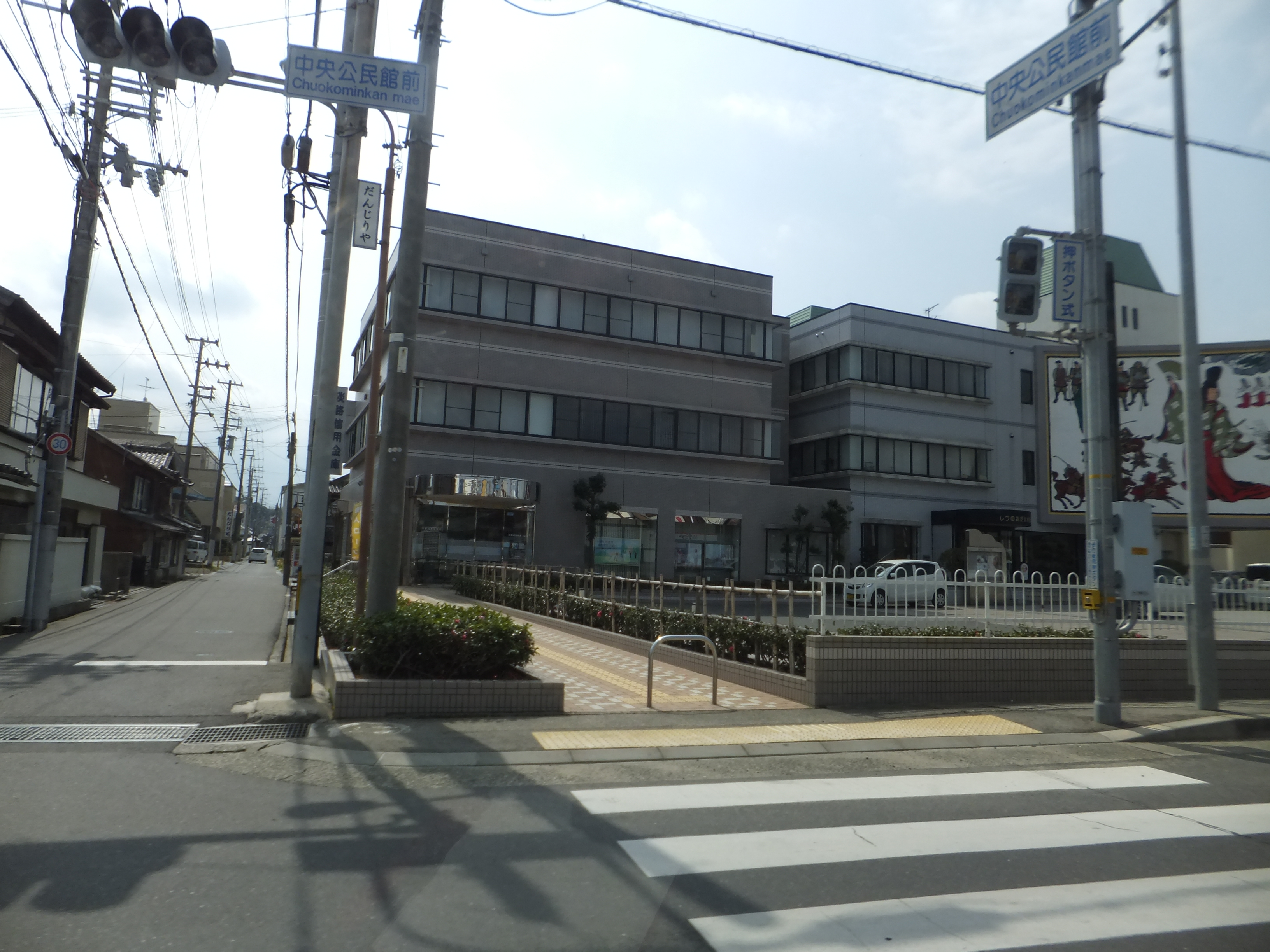 淡路信用金庫志筑支店